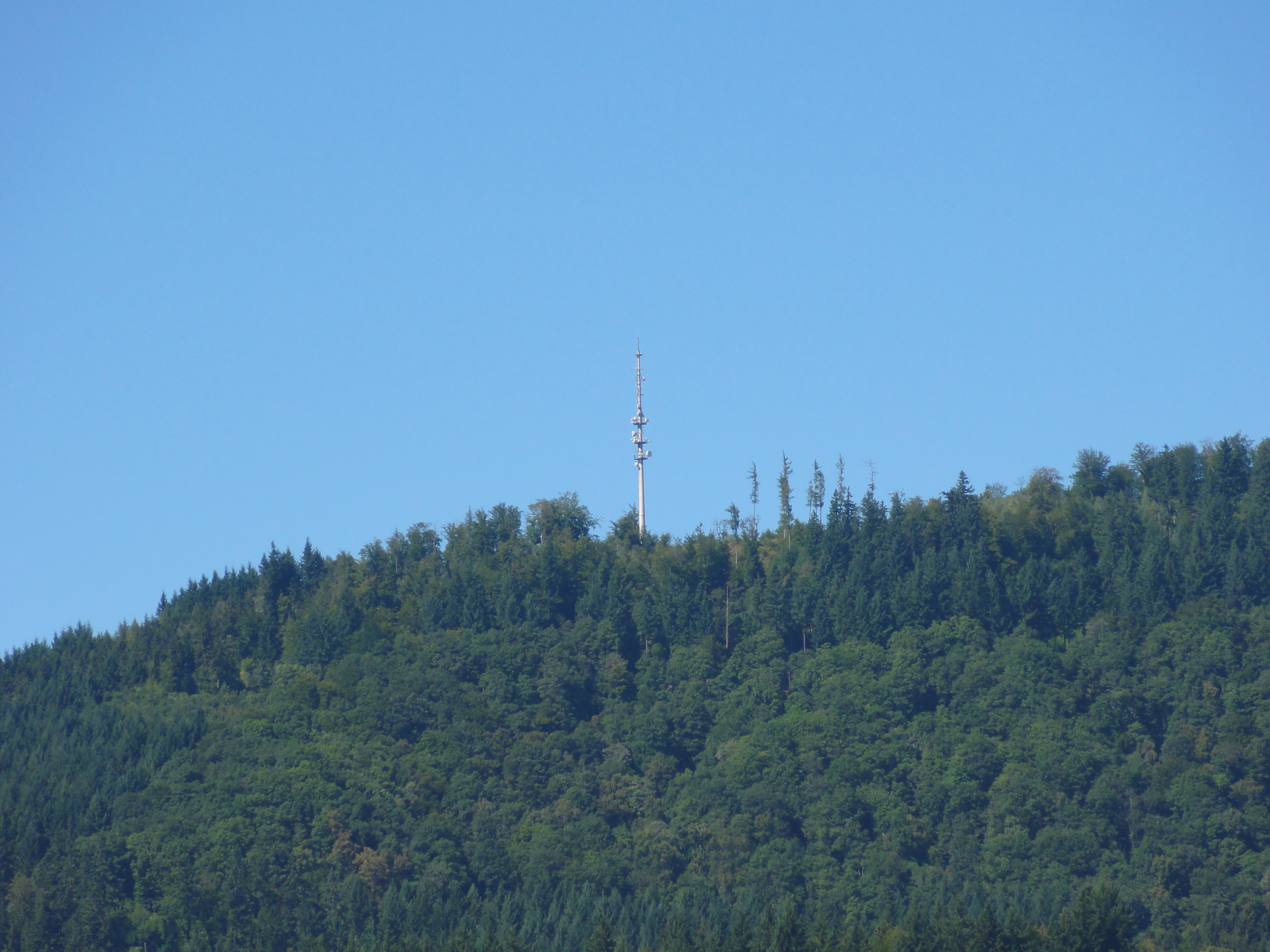 Fernsehturm auf dem Eggberg bei Bad Säckingen (Südwestrundfunk, 68 Meter hoher freistehenden Stahlfachwerkturm; Aufnahme von der Holzbrücke Bad Säckingen.